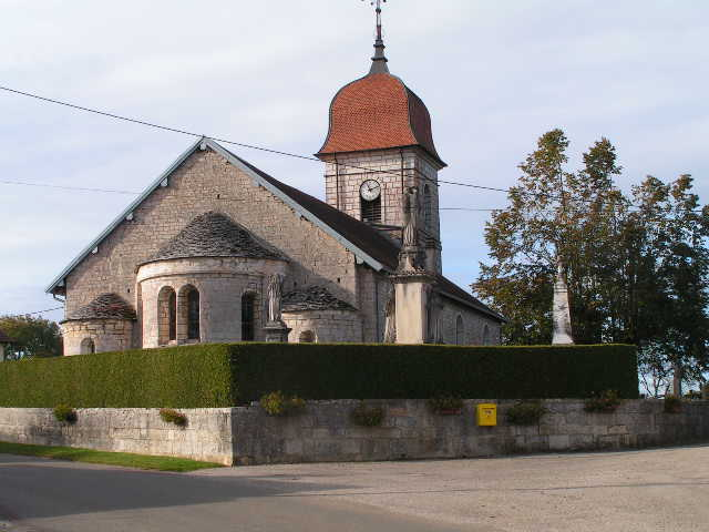 Chevet roman du XII° siècle. Le reste de l'église est daté de 1790.